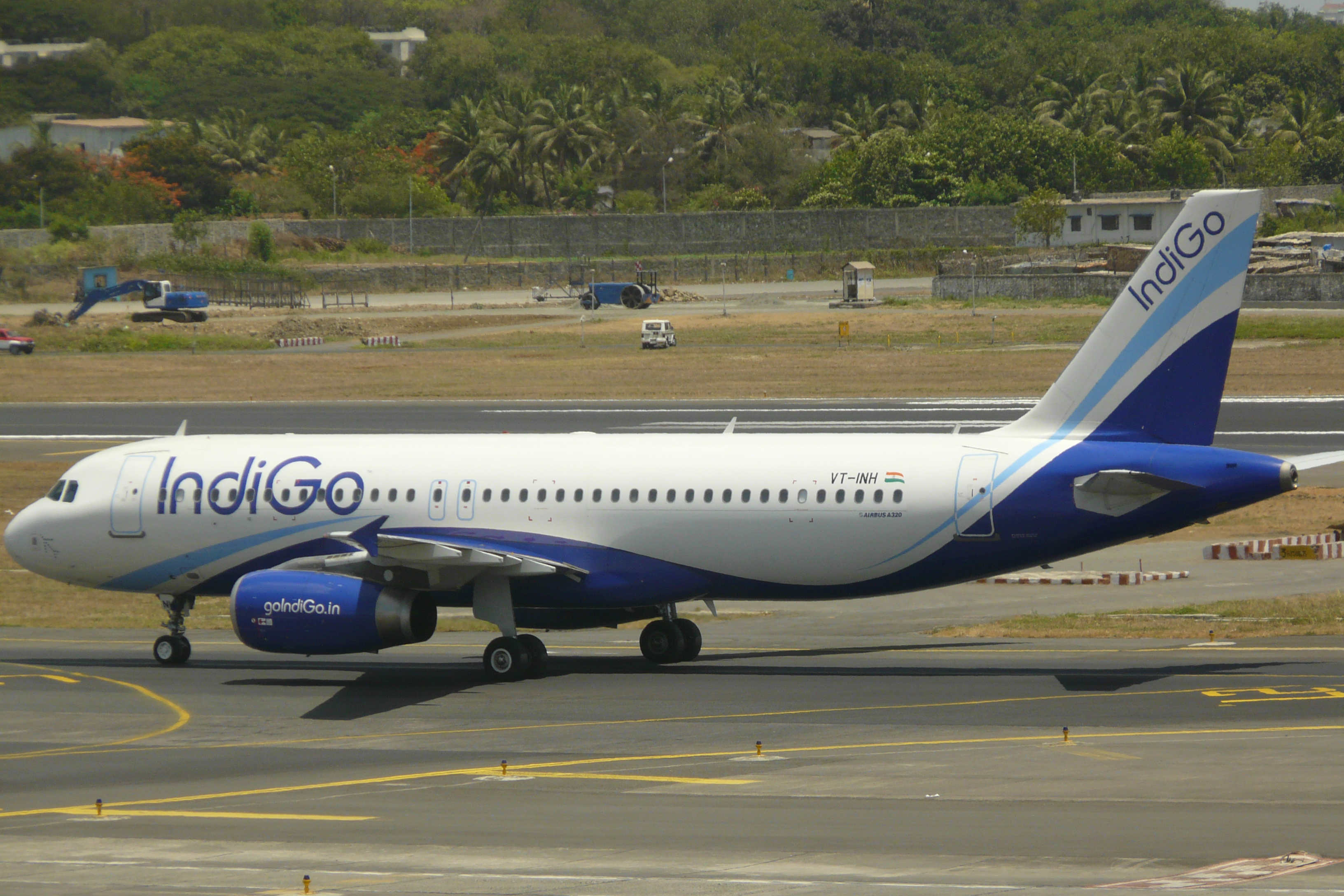 A320 der IndiGo(VT-INH)am Flughafen Mumbai